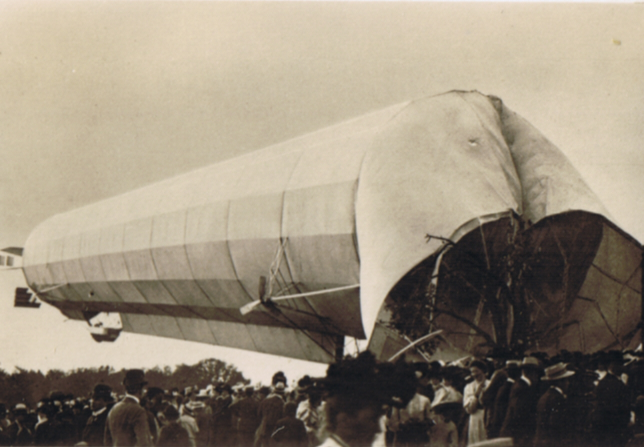 LZ 5 bei Göppingen 1909